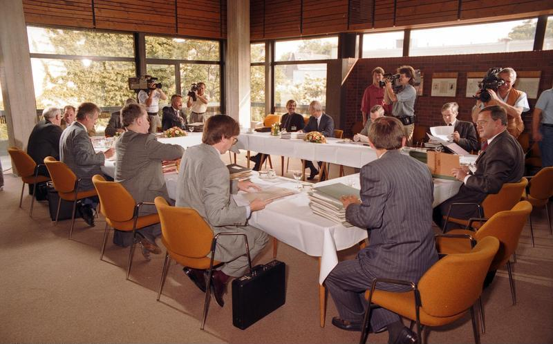 Konferenz der Innenminister der Bundesländer unter Vorsitz des Innenministers von Baden-Württemberg, Dietmar Schlee, in der Landesvertretung Baden-Württemberg. 29.6.1990